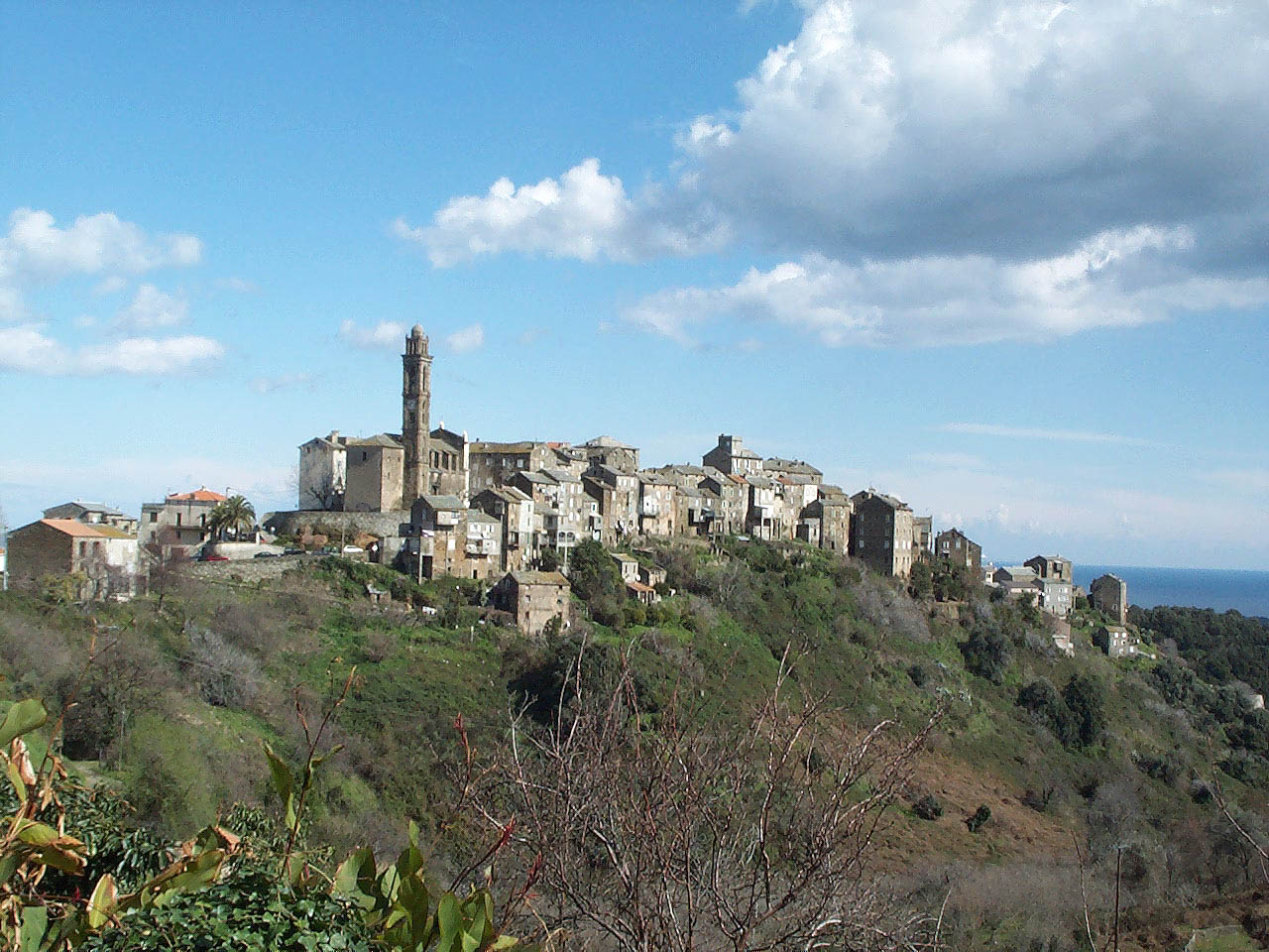 Vue du village de Venzolasca di Casinca en 2002